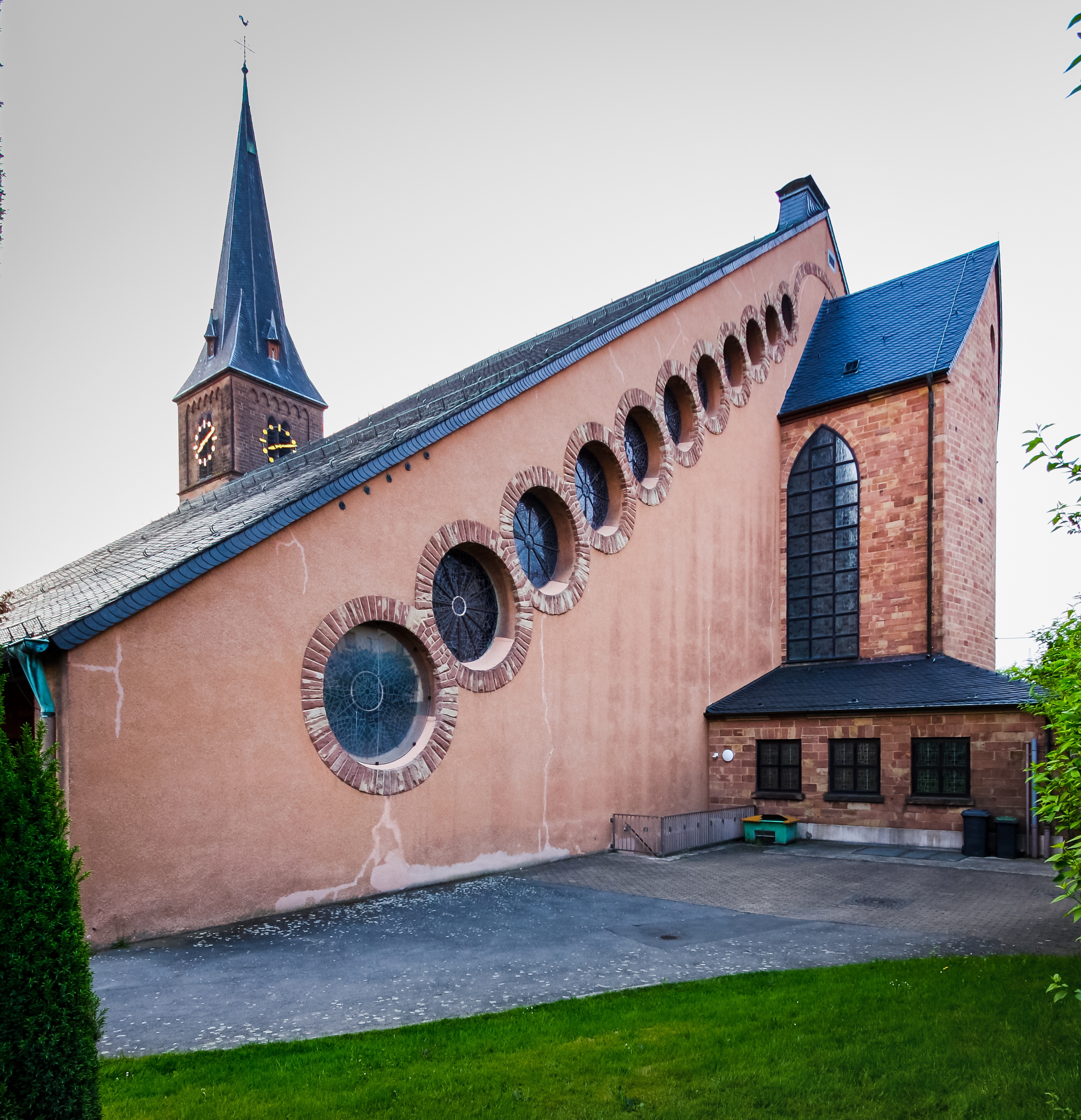 Liebfrauenkirche in Püttlingen, Architekt: Gottfried Böhm, Dominikus Böhm